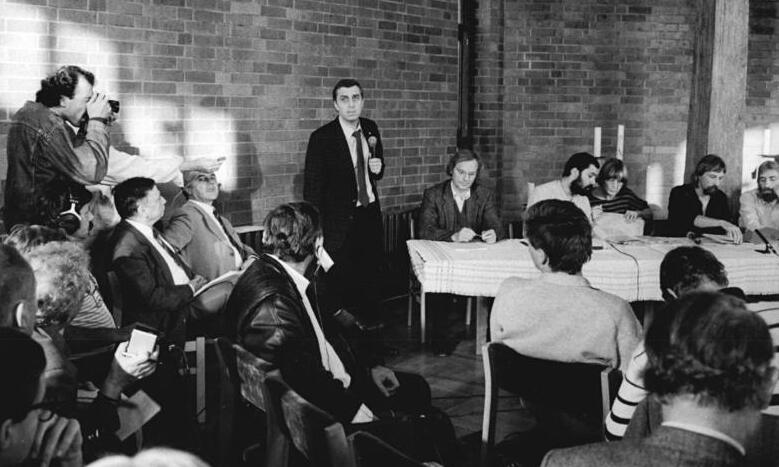 Berlin, Pressekonferenz zu Polizeiübergriffen ADN-ZB Settnik 23.10.89 Berlin: Pressekonferenz- Polizeieinsätze im Zusammenhang mit Demonstrationen am 7. und 8. Oktober dieses Jahres waren Gegenstand einer Pressekonferenz im Gemeindezentrum der evangelischen Kirchgemeinde am Fennfuhl. Vor Journalisten aus dem In- und Ausland informierten kirchliche und andere Gruppierungen über eine von ihnen zusammengestellte, etwa hundertseitige Dokumentation "Gedächtnisprotokolle" mit Erlebnis- und Tatsachenberichten betroffener Bürger und Augenzeugen der Geschehnisse. Als Teilnehmer der Konferenz bekräftigte der 1. Stellvertreter des Generalstaatsanwalts von Berlin, Klaus Voß (stehend), nochmals die bereits über Fernsehen und Jugendradio der DDR gemachten Zusicherungen.